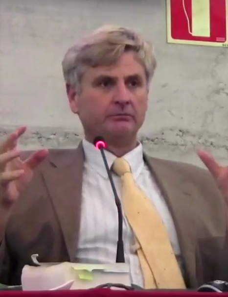 Federico Aznar Fernández de Montesinos, 2016.